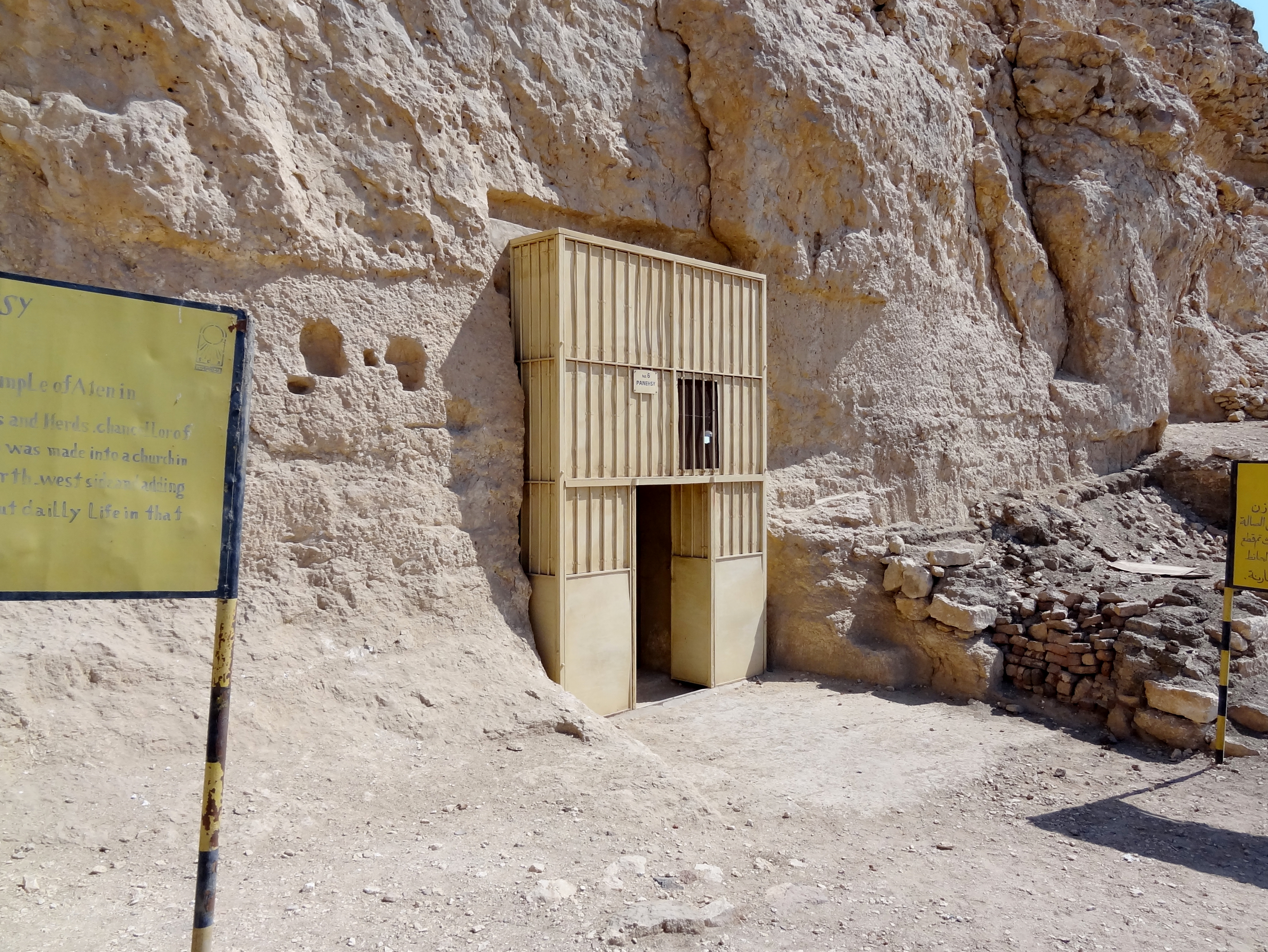 Grab des Panehsi (TA 6) in Tell el-Amarna, Ägypten